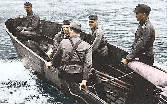 Aaro Pajari yliuttää syöksyveneellä Syvärin.